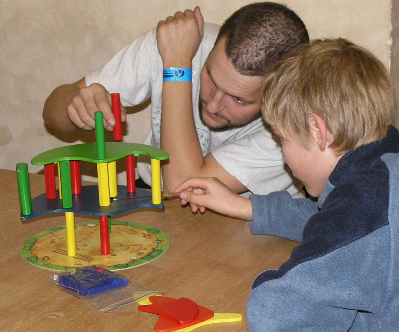 Deskohraní 2008